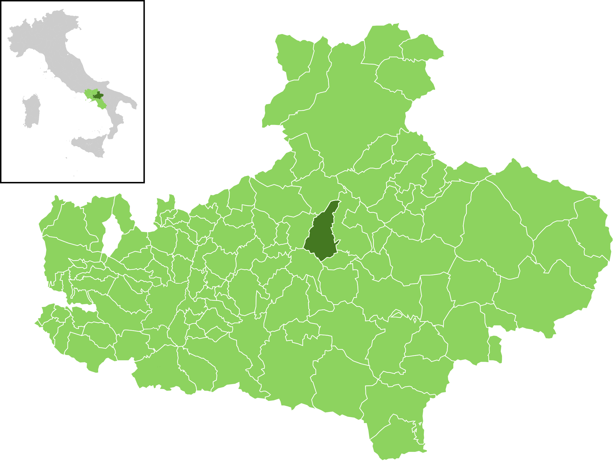 Il comune all'interno della provincia di Avellino